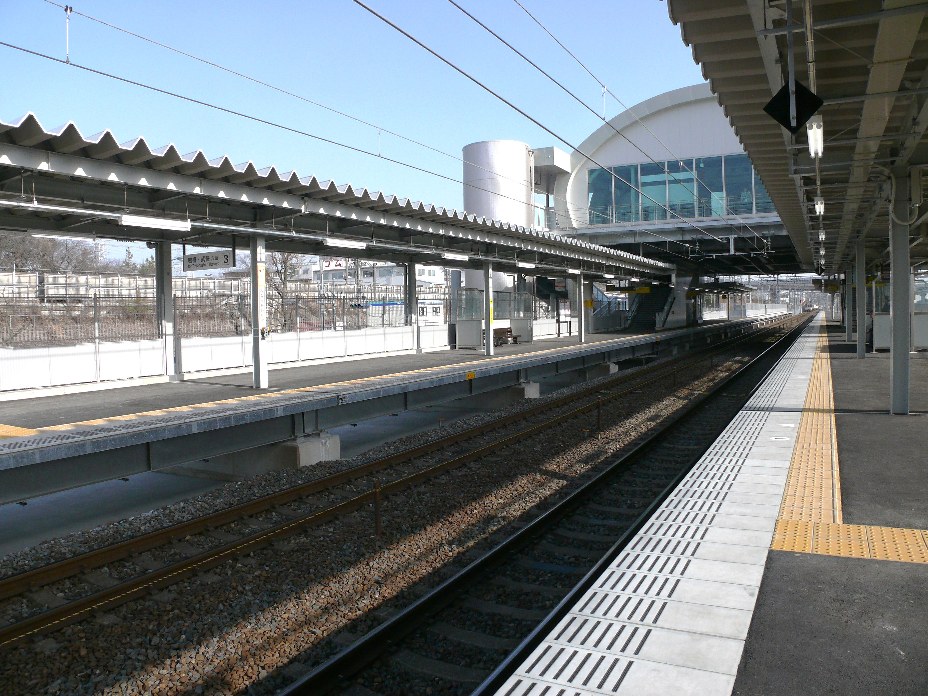 JR東海の東海道本線の南大高駅